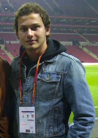 Mertan Sivasspor maçı öncesi